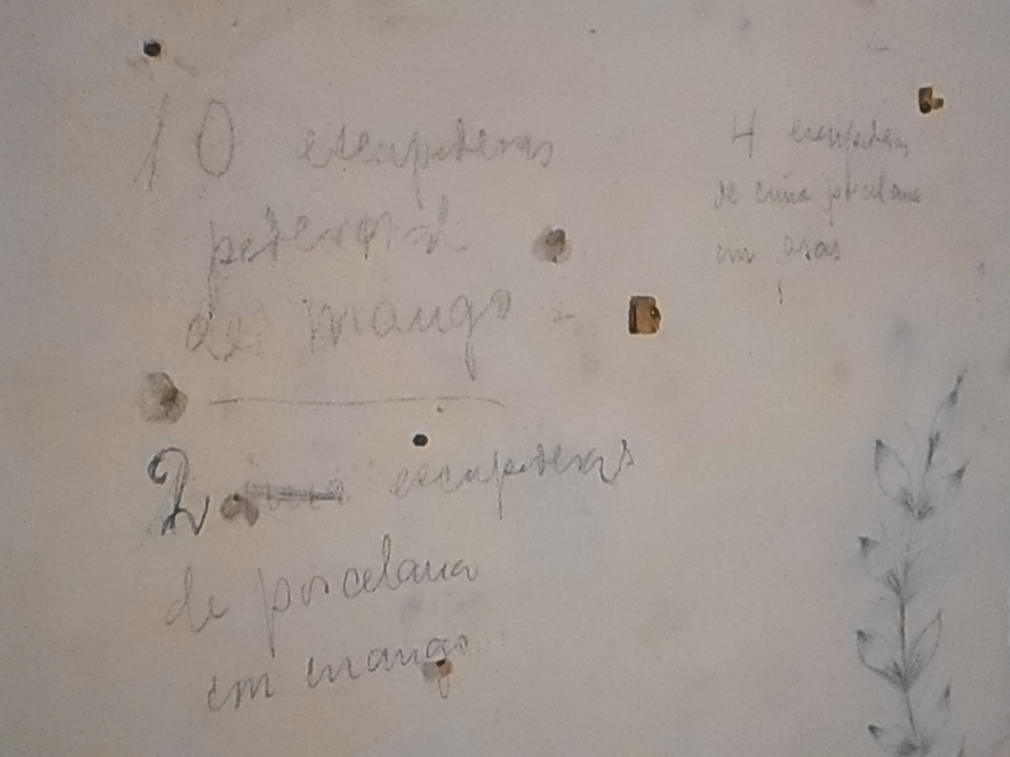 Sirvió de escondite republicano donde se refugiaban los pertenecientes al hospital (hoy Palacio de los Condes de Ayala) en Castuera, durante la Guerra Civil.